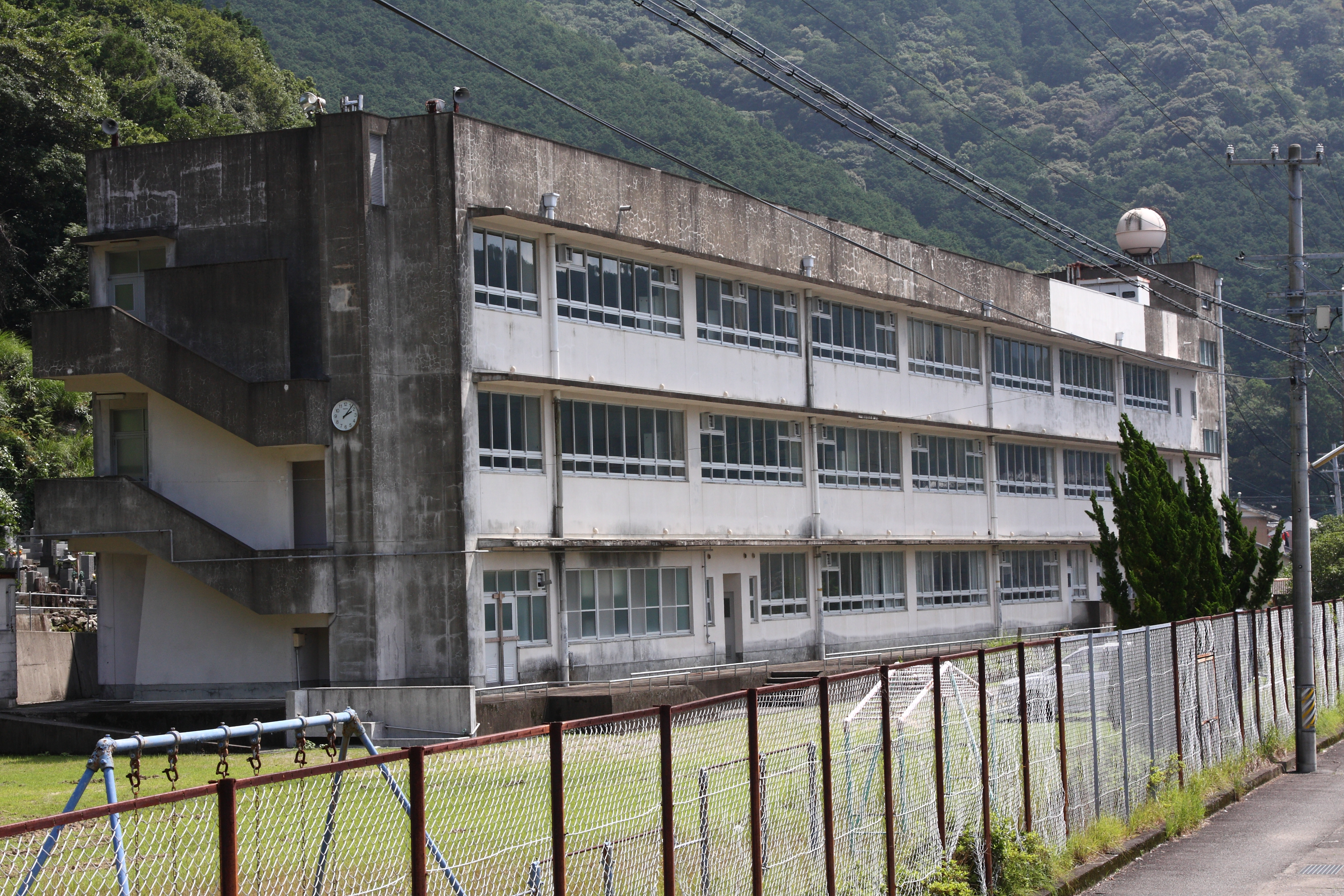 須賀利小学校跡 三重県尾鷲市須賀利町